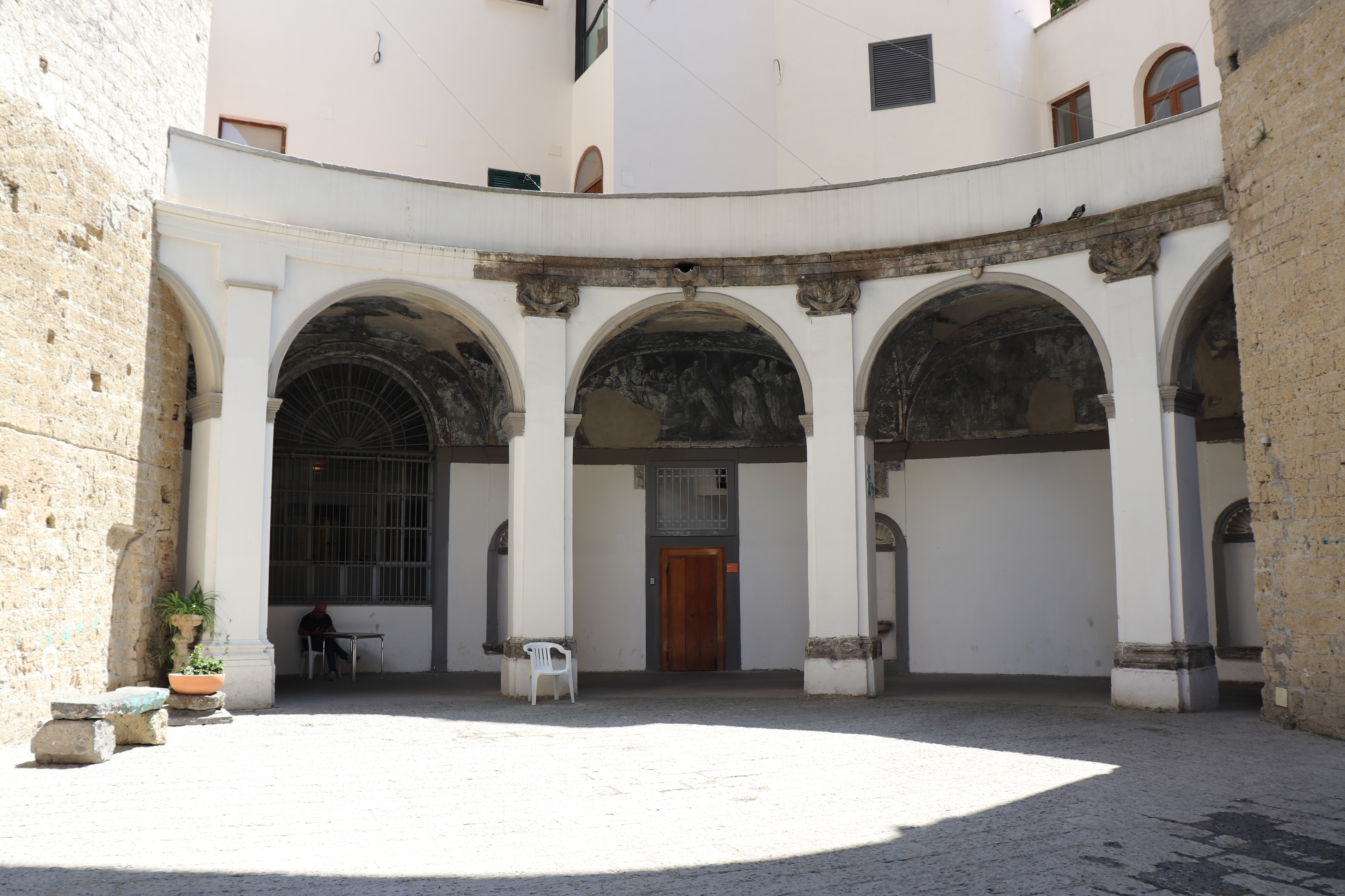 San Gaudioso (Napoli) - il chiostro